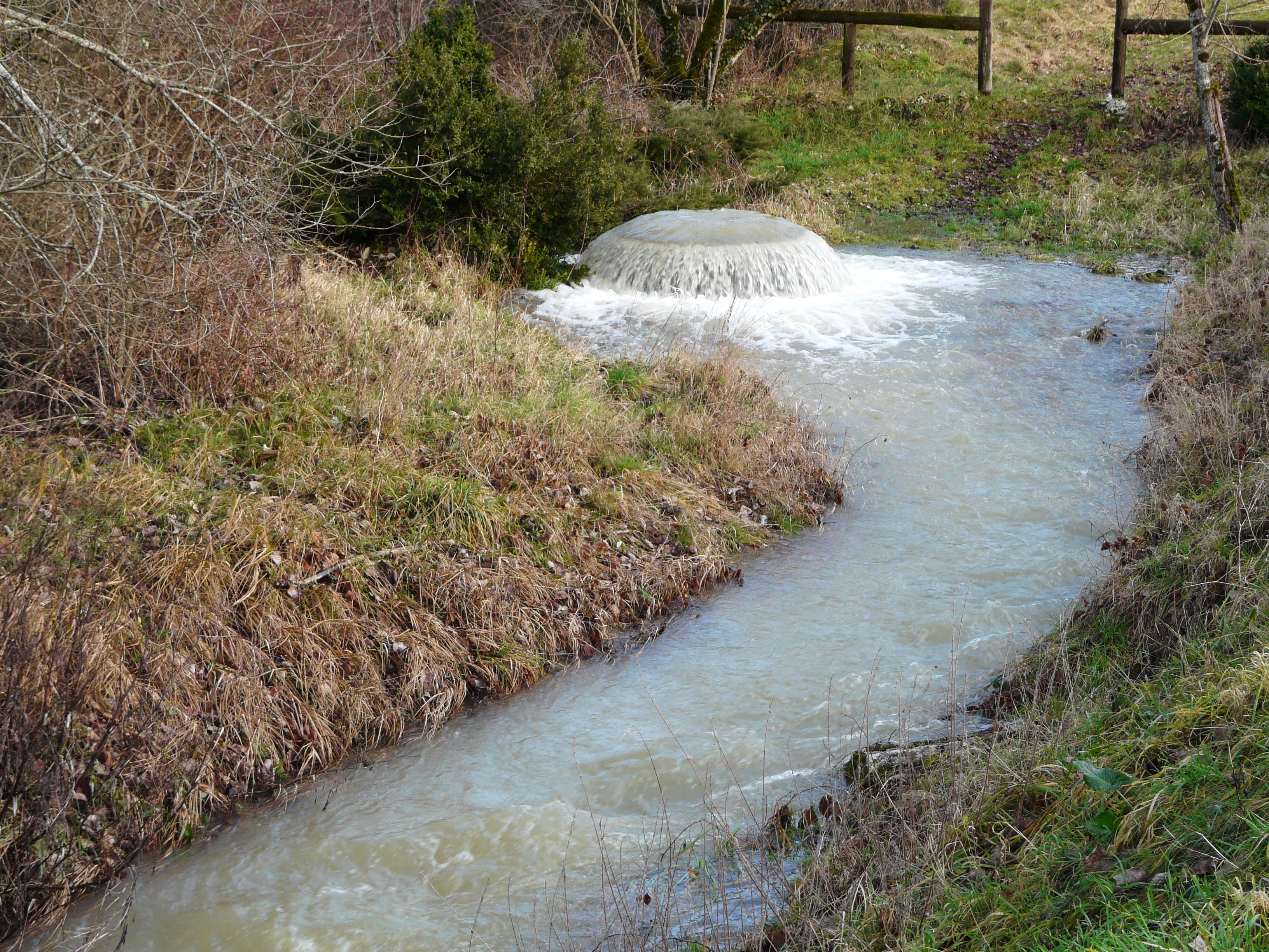 Source artésienne du Blâme (après une période de plusieurs jours de fortes pluies), puits de Bontemps, Brouchaud, Dordogne, France